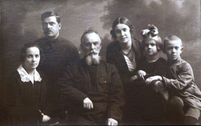 Родныя Уладзіміра Караткевіча: цётка Яўгенія Васілеўна, бацька Сямён Цімафеевіч, дзед Васіль Юллянавіч Грынкевіч, сястра Наталля і брат Валерый.